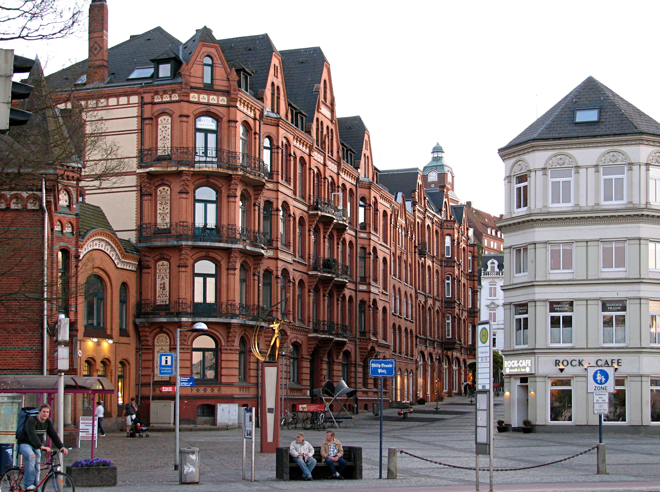 Willy-Brandt-Platz bzw. Schiffbrückplatz in Flensburg